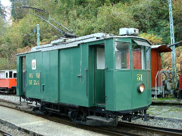 Historischer Post Strassenbahn Motorwagen Ze 2/2 31 der ehemaligen Rheintalischen Strassenbahn (RhSt), heute Rheintal Bus (RTB), auf dem Museums-Areal der Museumsbahn Blonay-Chamby (BC) in Chamby-Musée (Chaulin) im Oktober 2008.